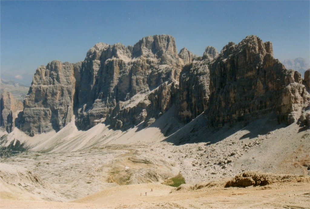 AU: Ettore Dal Farra; fonte: foto proprio archivio; descr: Le Tofane viste dal Lagazuoi; licenza: pubblico dominio